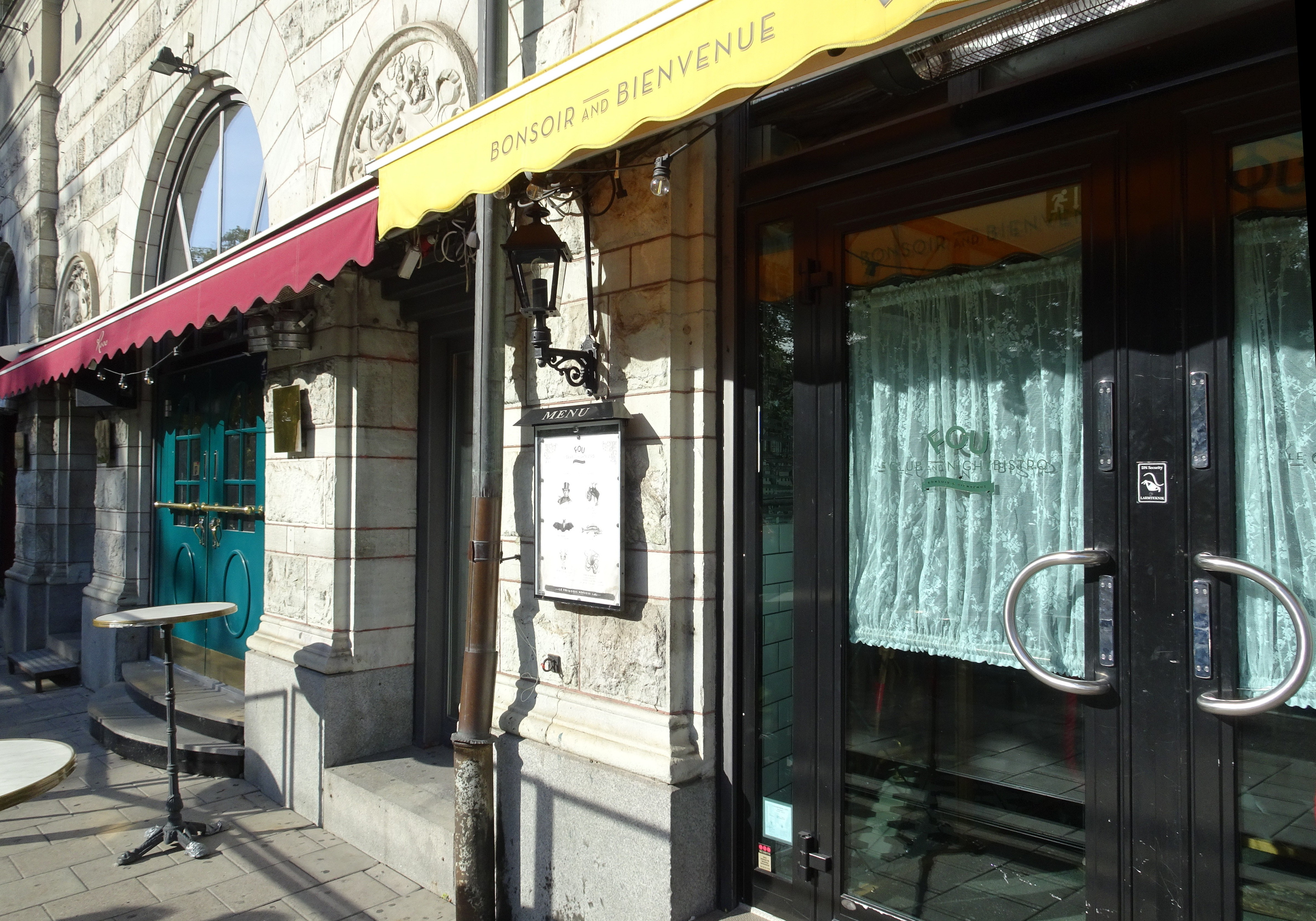 Hamngatan 2, nattklubben och nattbistron FOU, tidigare restaurang Bäckahästen